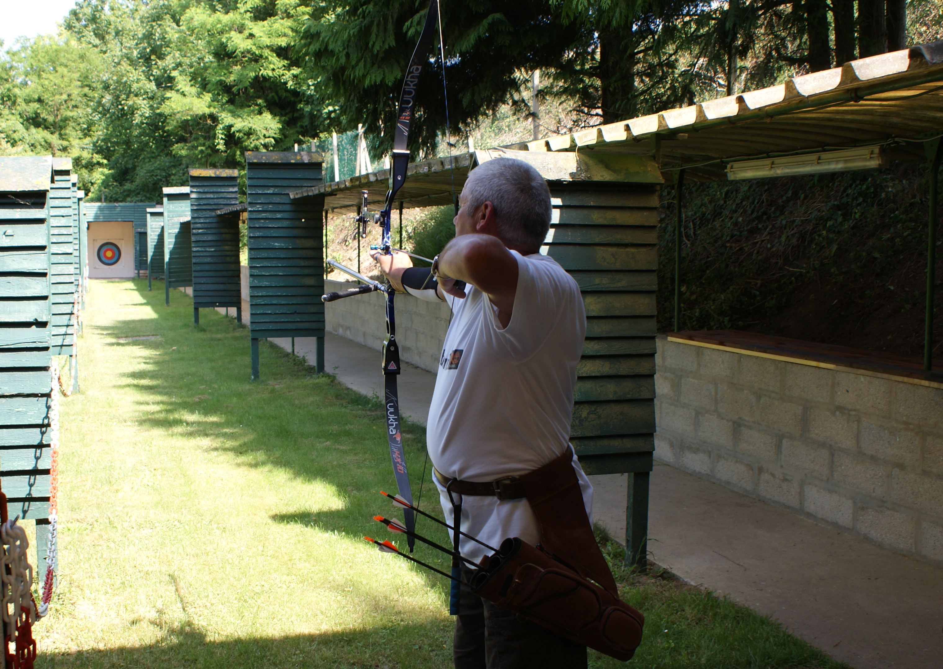 Pas de tir du club de tir à l'arc de Gandelu, la "Ronde Sud Aisne Gandelu". En position de tir, jean-Jacques, le roi des archers de l'année 2013, lauréat du concours annuel au tir à l'oiseau.